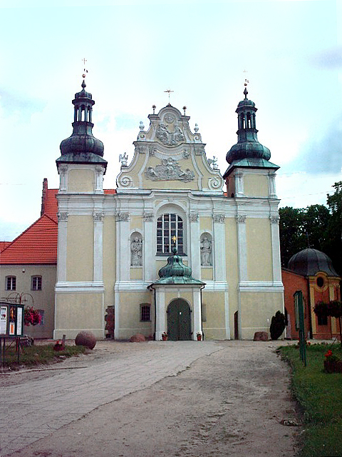 Strzelno - fasada kościoła Św. Trójcy